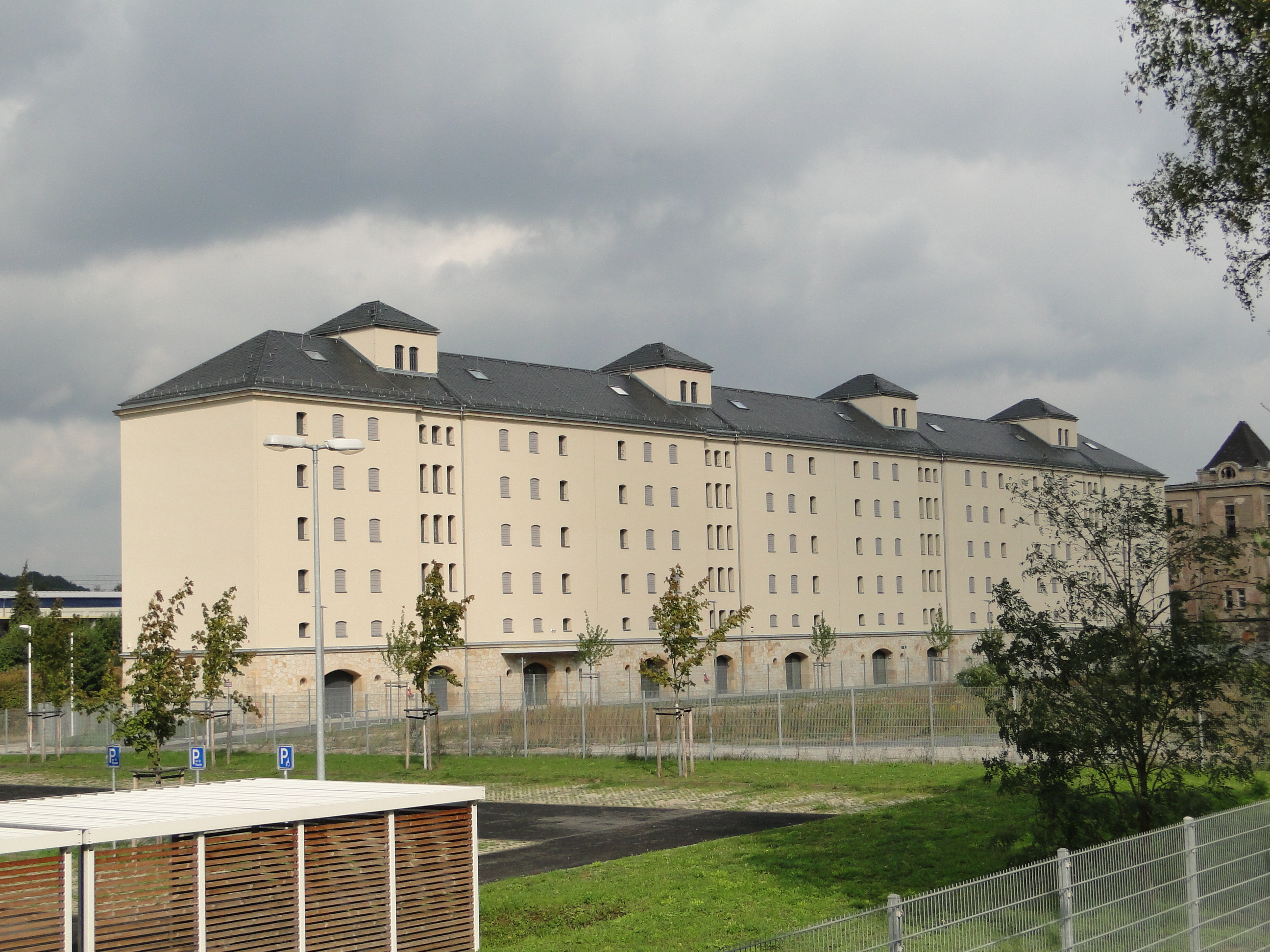 Kulturdenkmal Elisabeth-Boer-Straße 7 Dresden Speicher